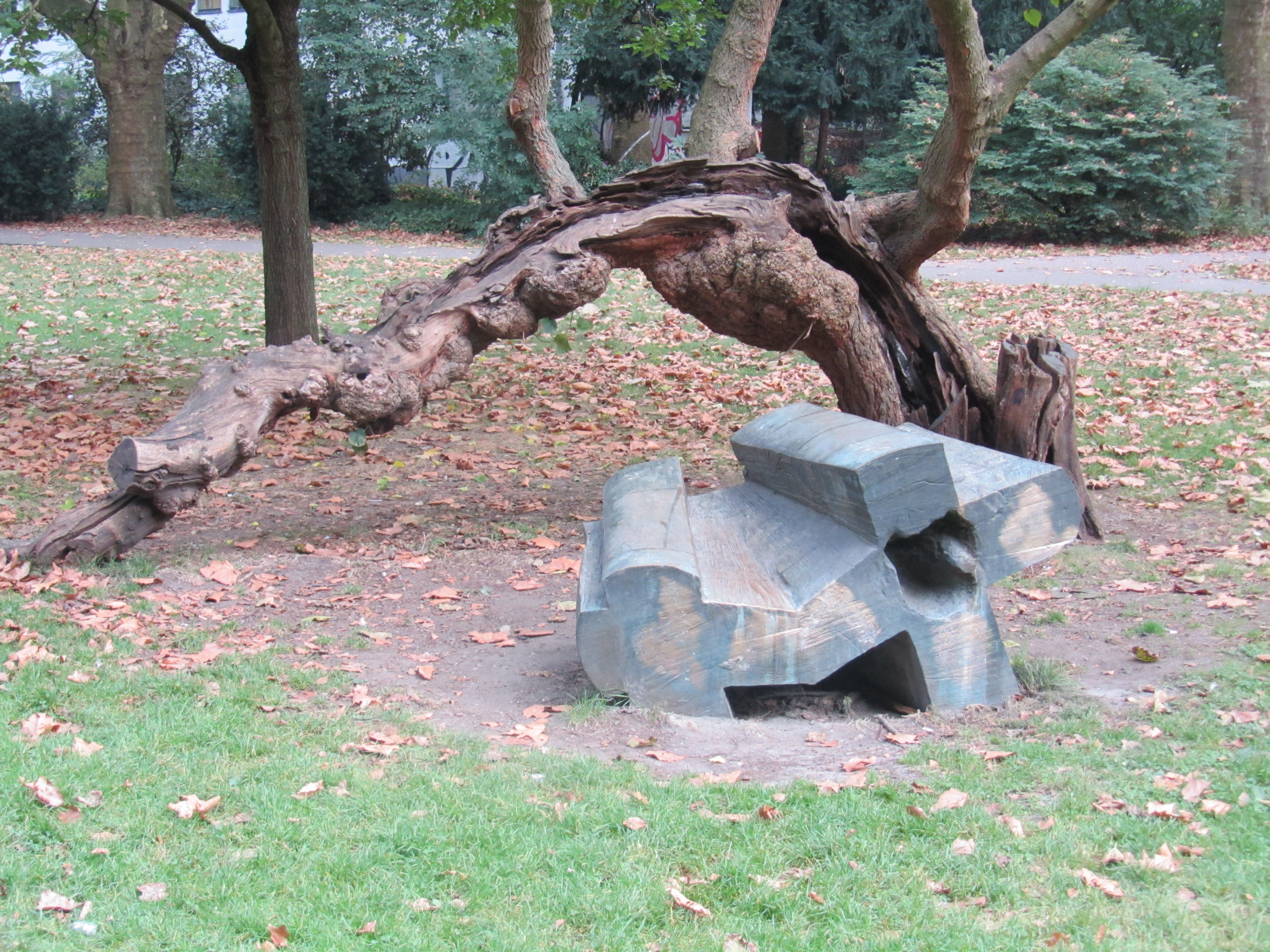 Klaus Simon: Skulptur für einen Baum (1989/1990) im Immanuel-Kant-Park, Duisburg (Lehmbruck-Museum)